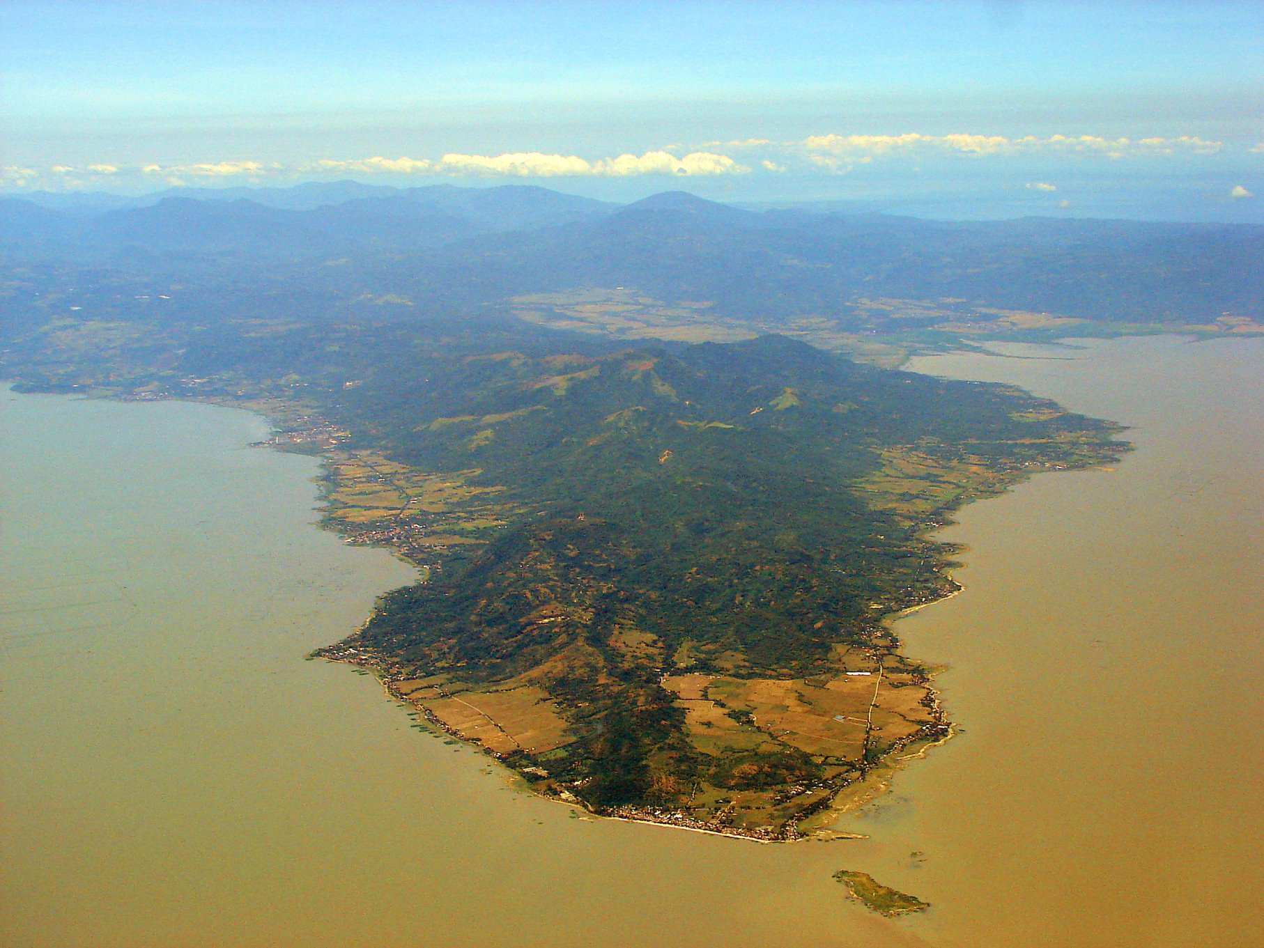 Jalajala, Rizal, Philippines